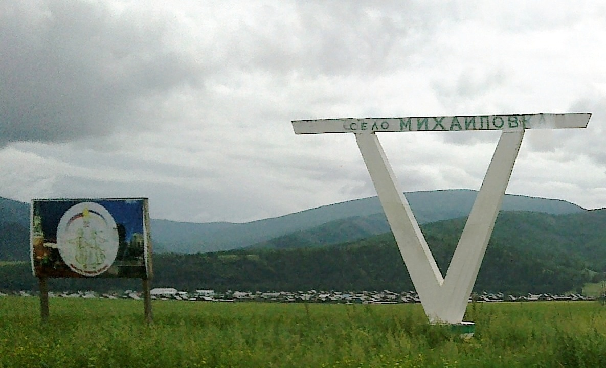 село Михайловка(Бурятия)